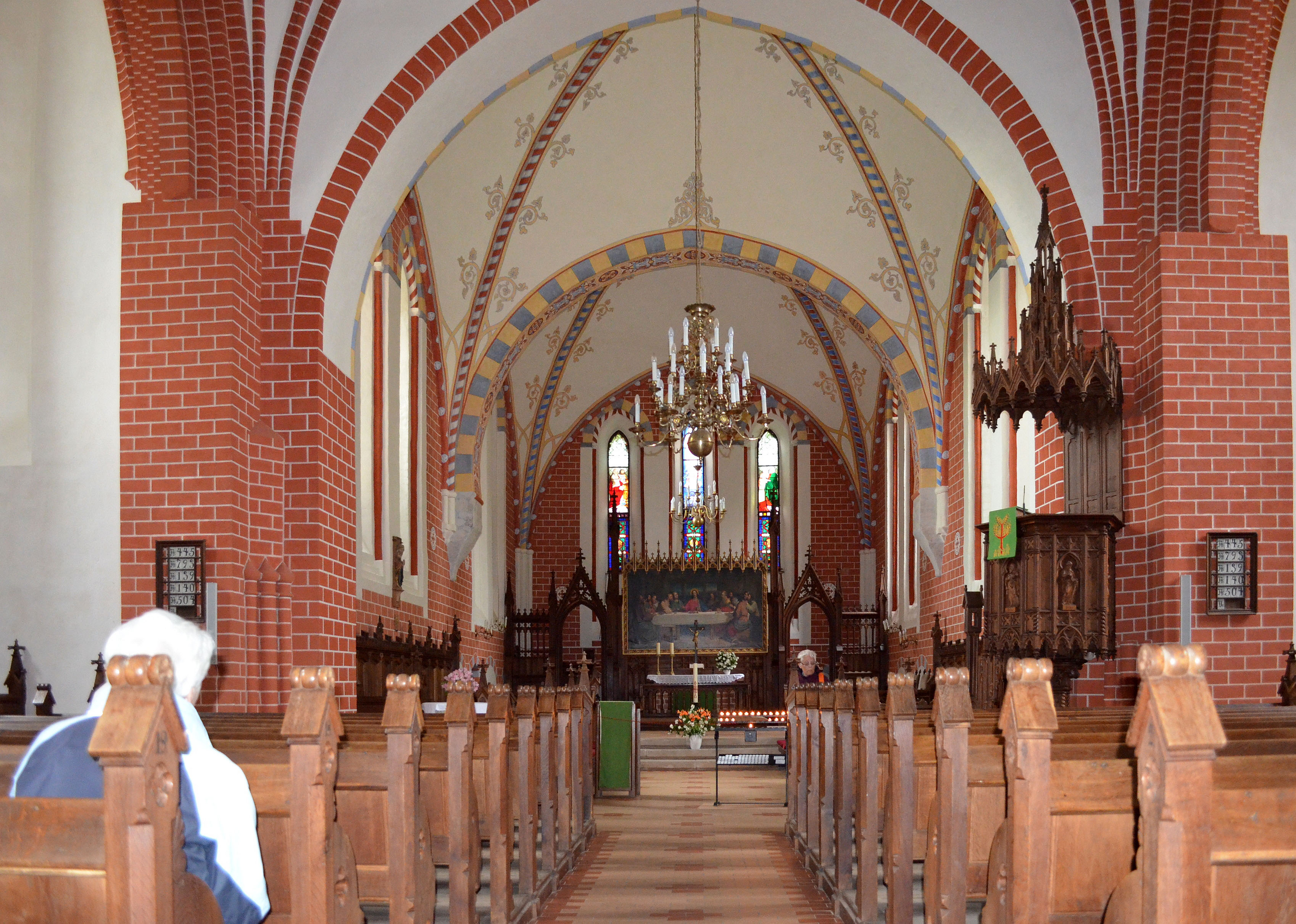 Röbel, Marienkirche, Blick durch das Kirchenschiff auf den Altar 2